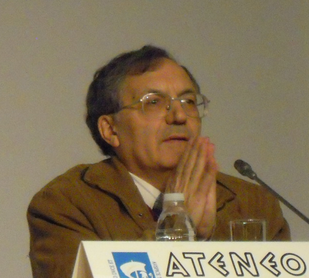 José Martinho Montero Santalha no Museo de Pontevedra